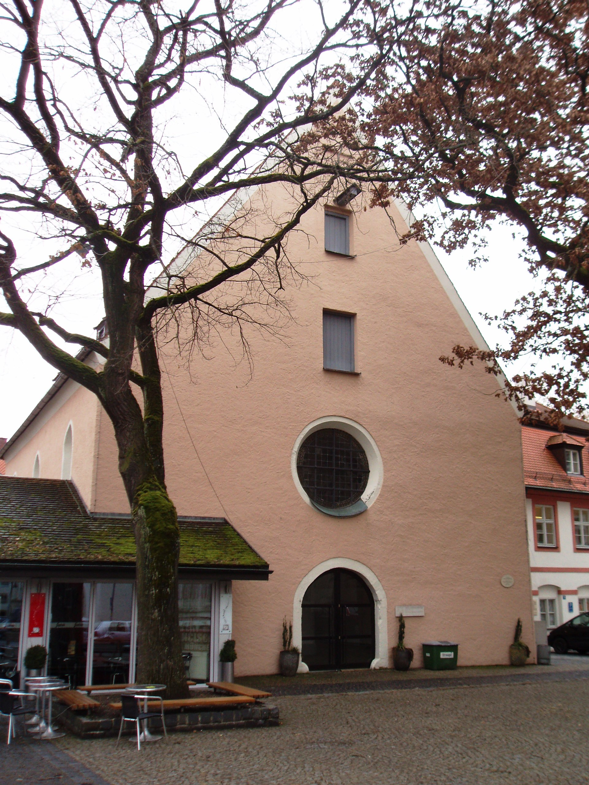 Westseite_der_ehemaligen_Taufkirche_St._Johannes_am_Domplatz_zu_Eichstätt